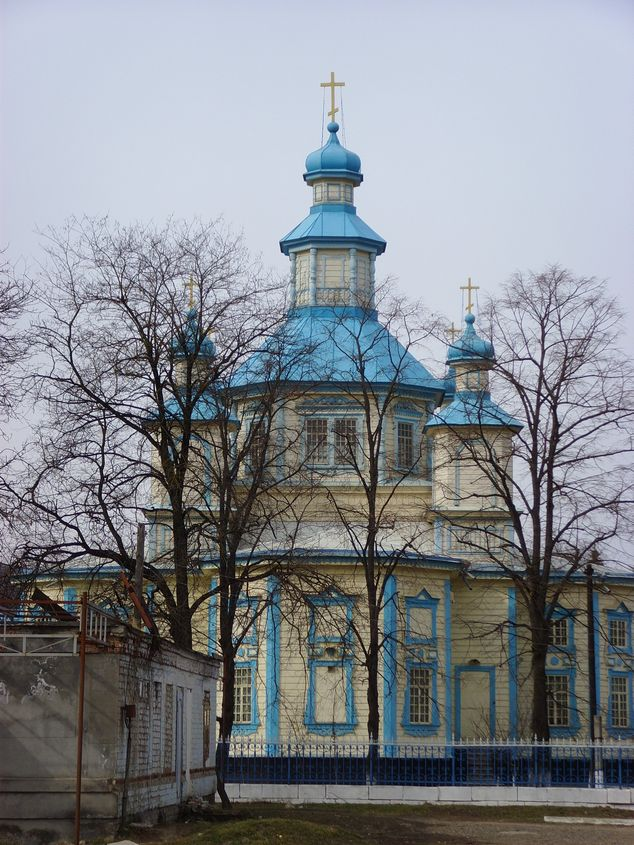 Церковь в станице Лысогорская